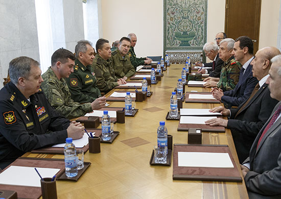 Рабочая поездка Министра обороны РФ генерала армии Сергея Шойгу в Сирию. Во время встречи с Президентом Сирийской Арабской Республики Башаром Асадом в Дамаске